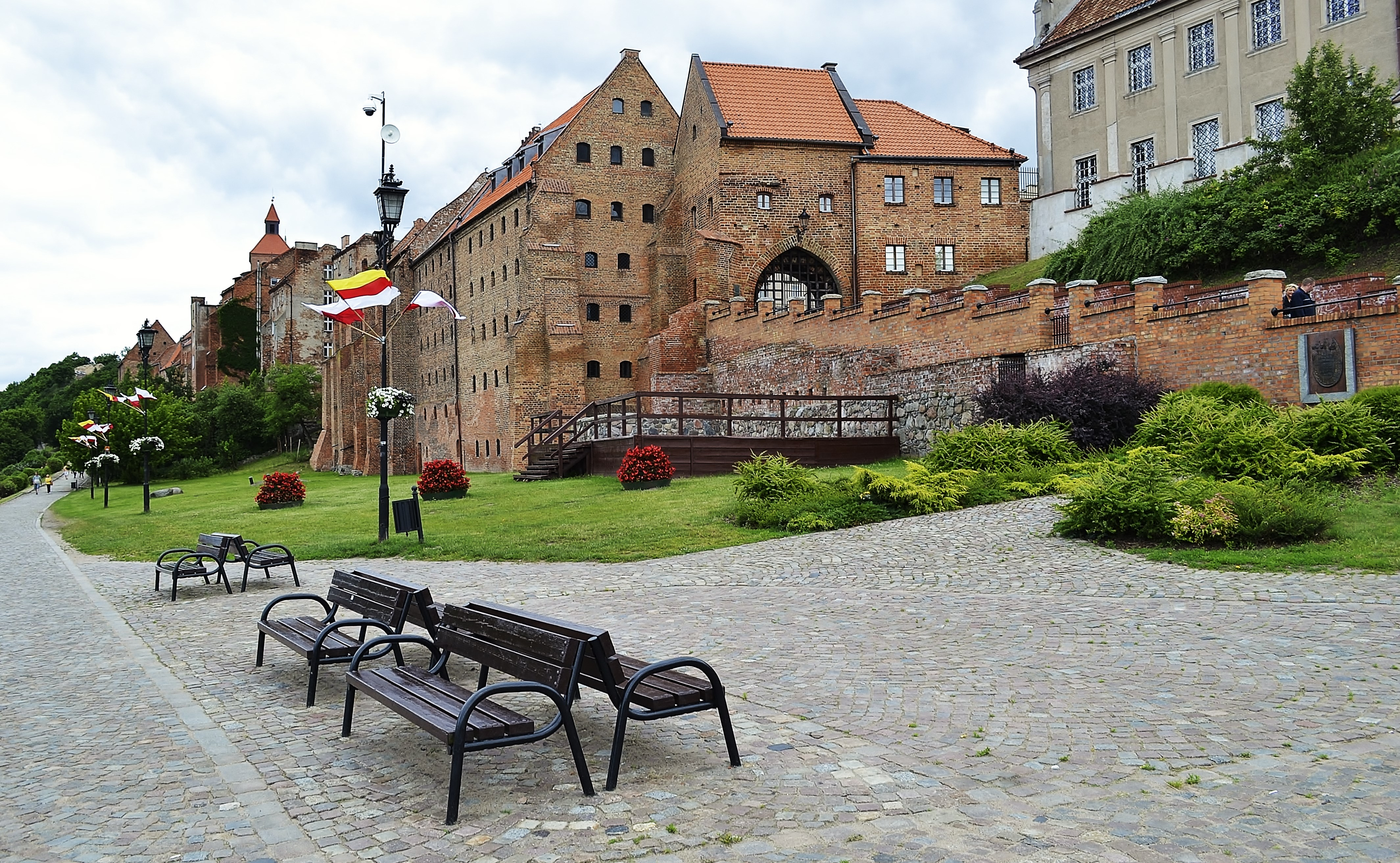 Brama Wodna i spichrza